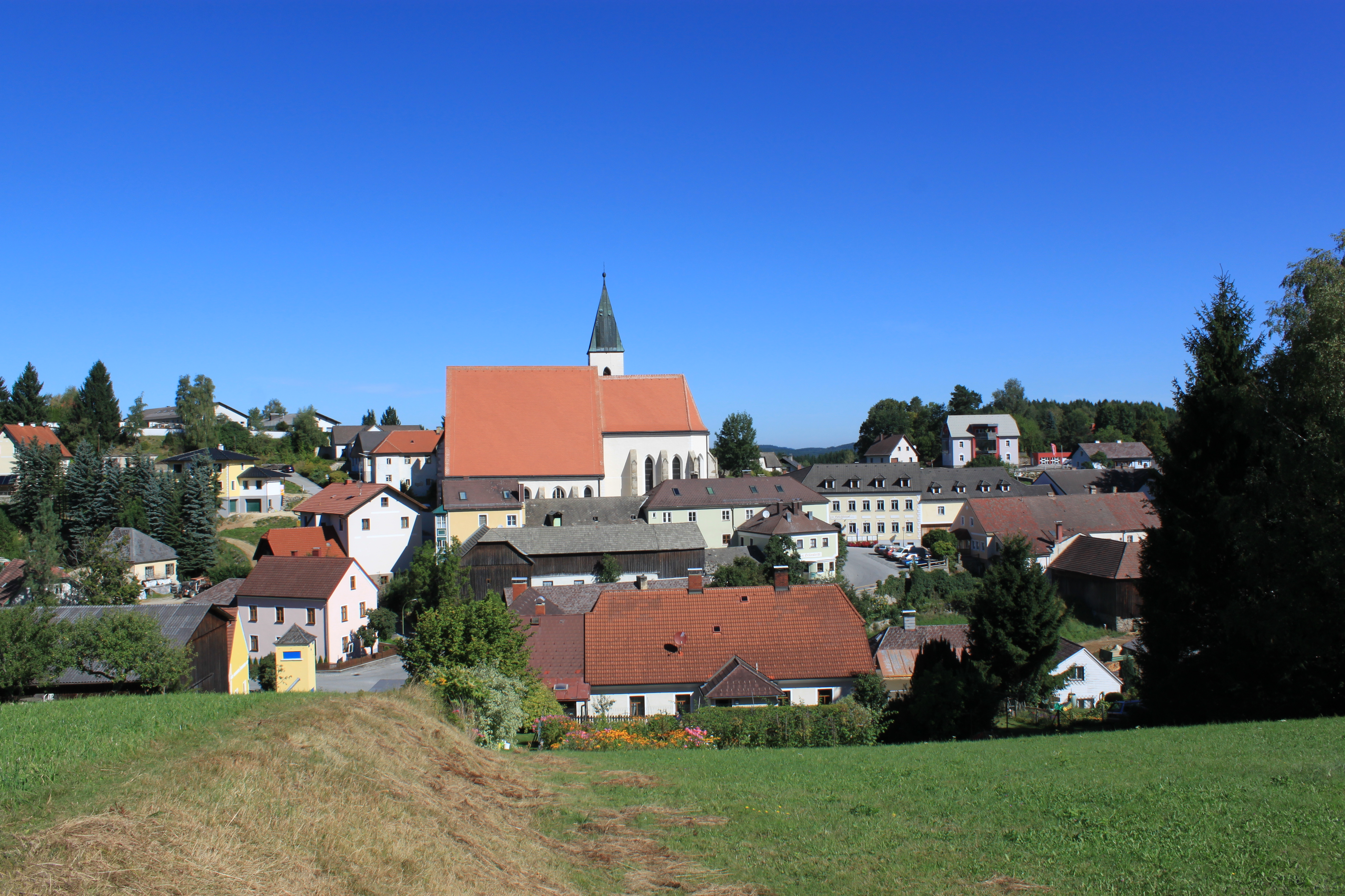 Schönbach, Niederösterreich - Blick auf den Ort